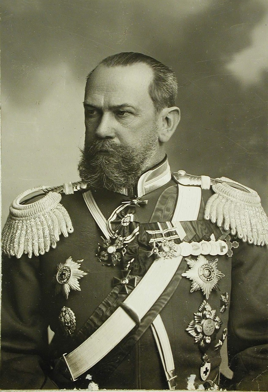 Генерал от инфантерии, командир Забайкальских казачьих войск, член штаба г. Иркутска Эверт А.Е., (портрет).